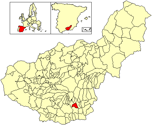 Situación del término municipal de Almegíjar respecto a la provincia de Granada, en España.